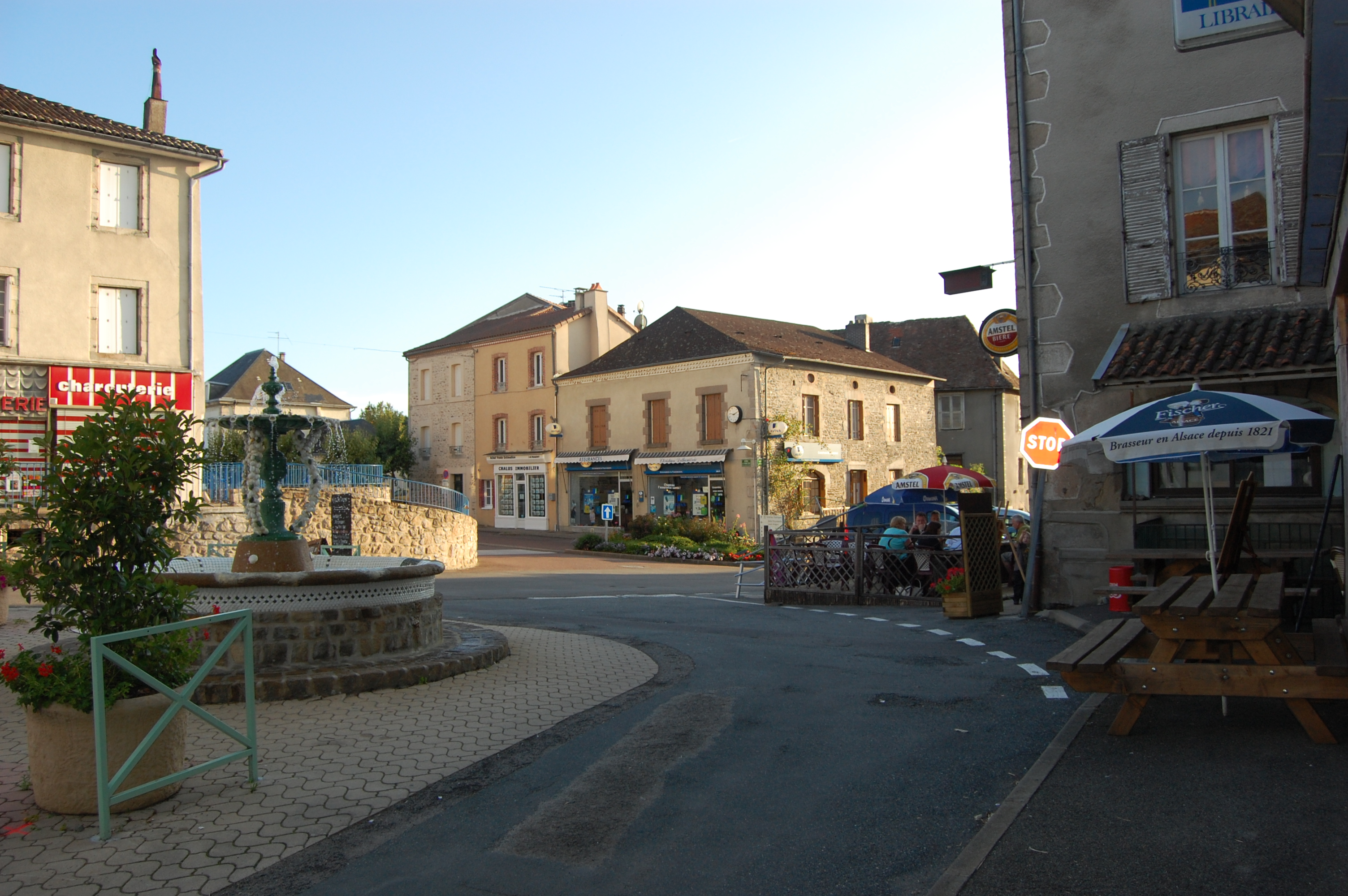 Châlus, centre ville